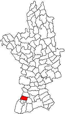 Categorie:Hărţi ale judeţului Olt